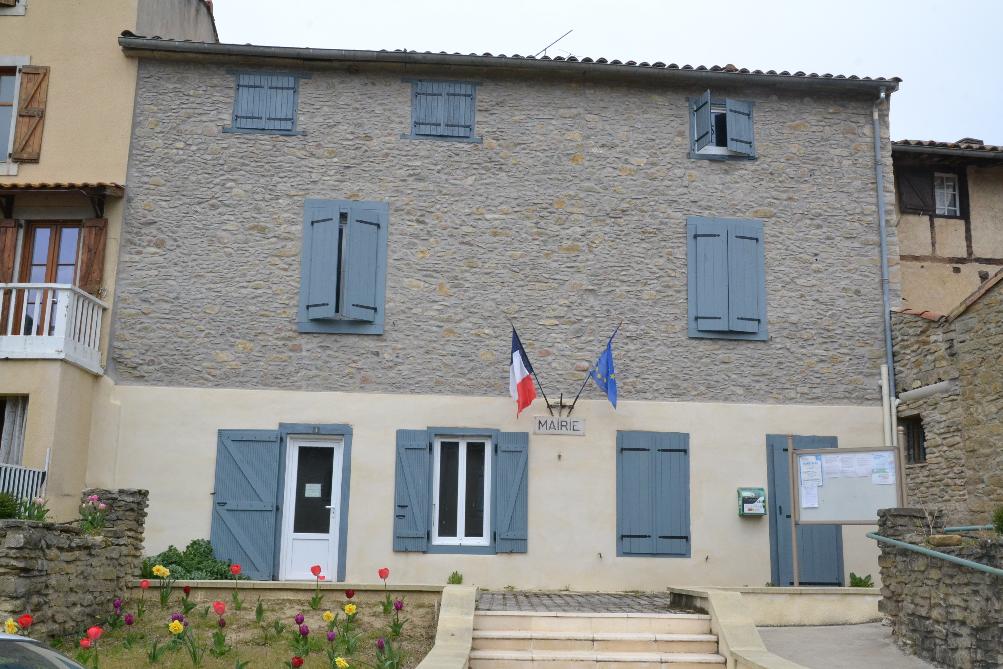 Mairie de Sonnac-sur-l'Hers (Aude, France).